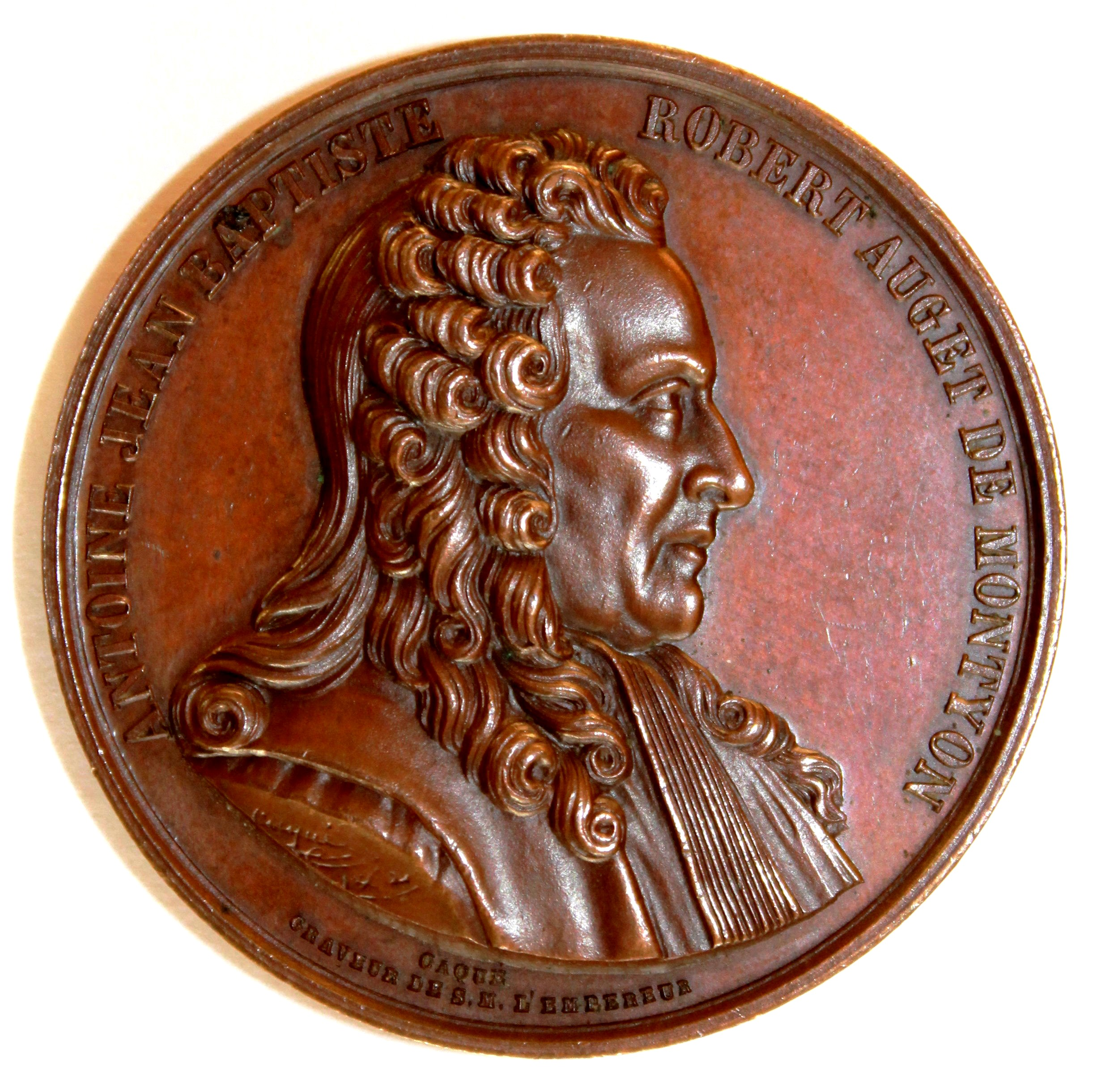 Médaille de Antoine-Jean-Baptiste-Robert Auget (1733-1820) baron de Montyon. Cette médaille était destinée à récompenser les lauréats du Prix Montyon